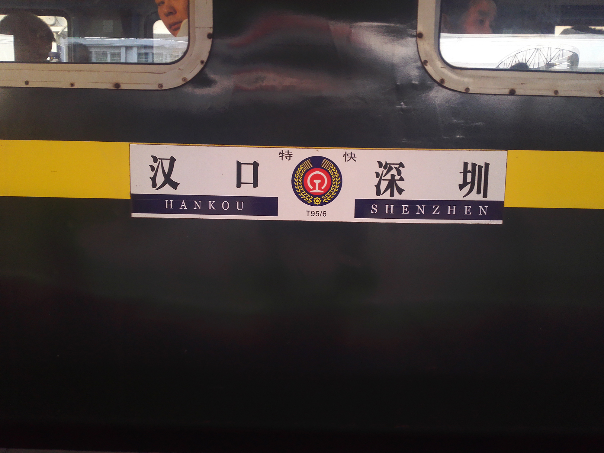 中文（中国大陆）: T95/96次列车水牌